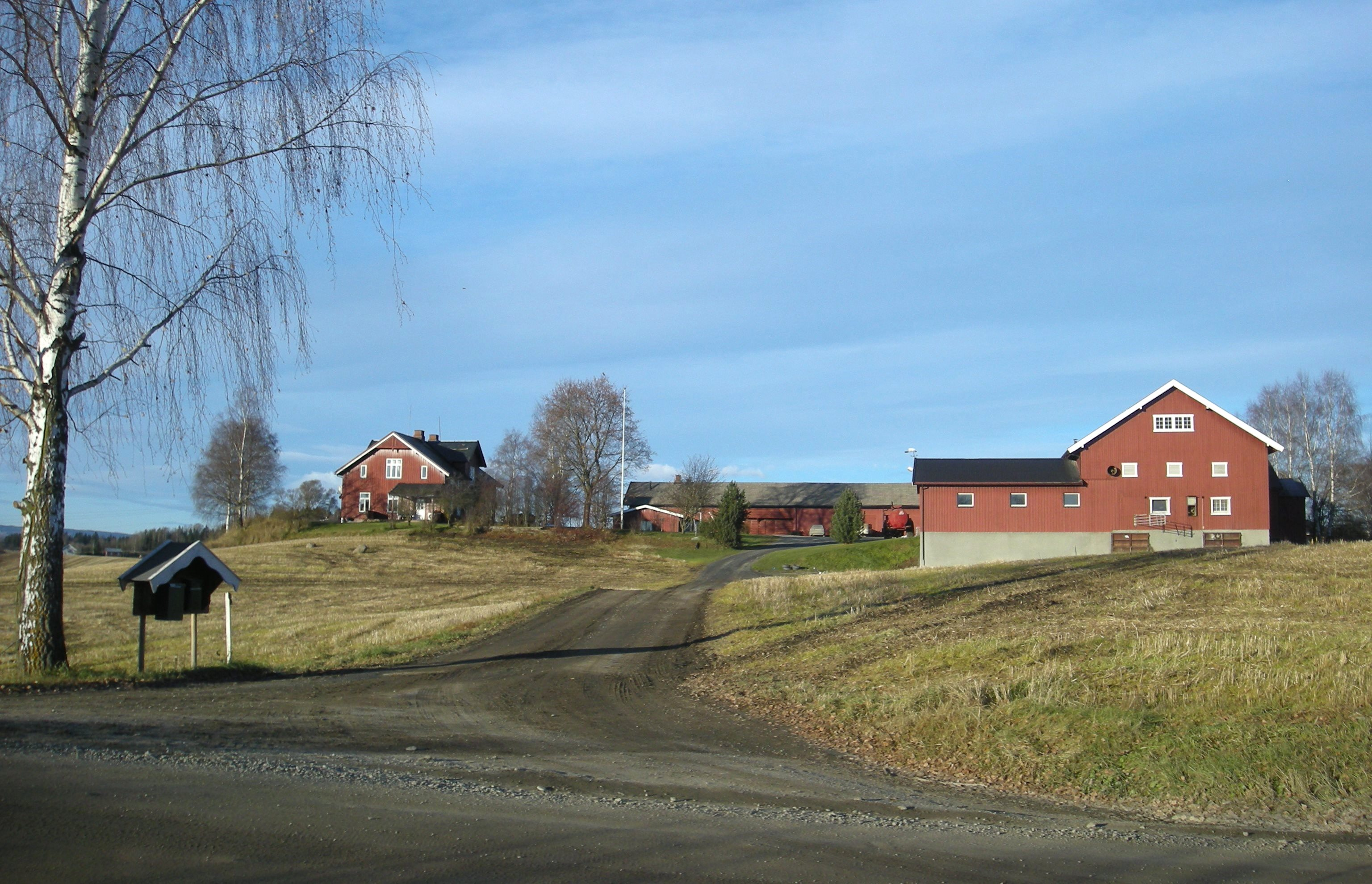 Fylkesvei 1822 (tidl. 124) passerer Hol vestre i Vang (nå Hamar kommune).